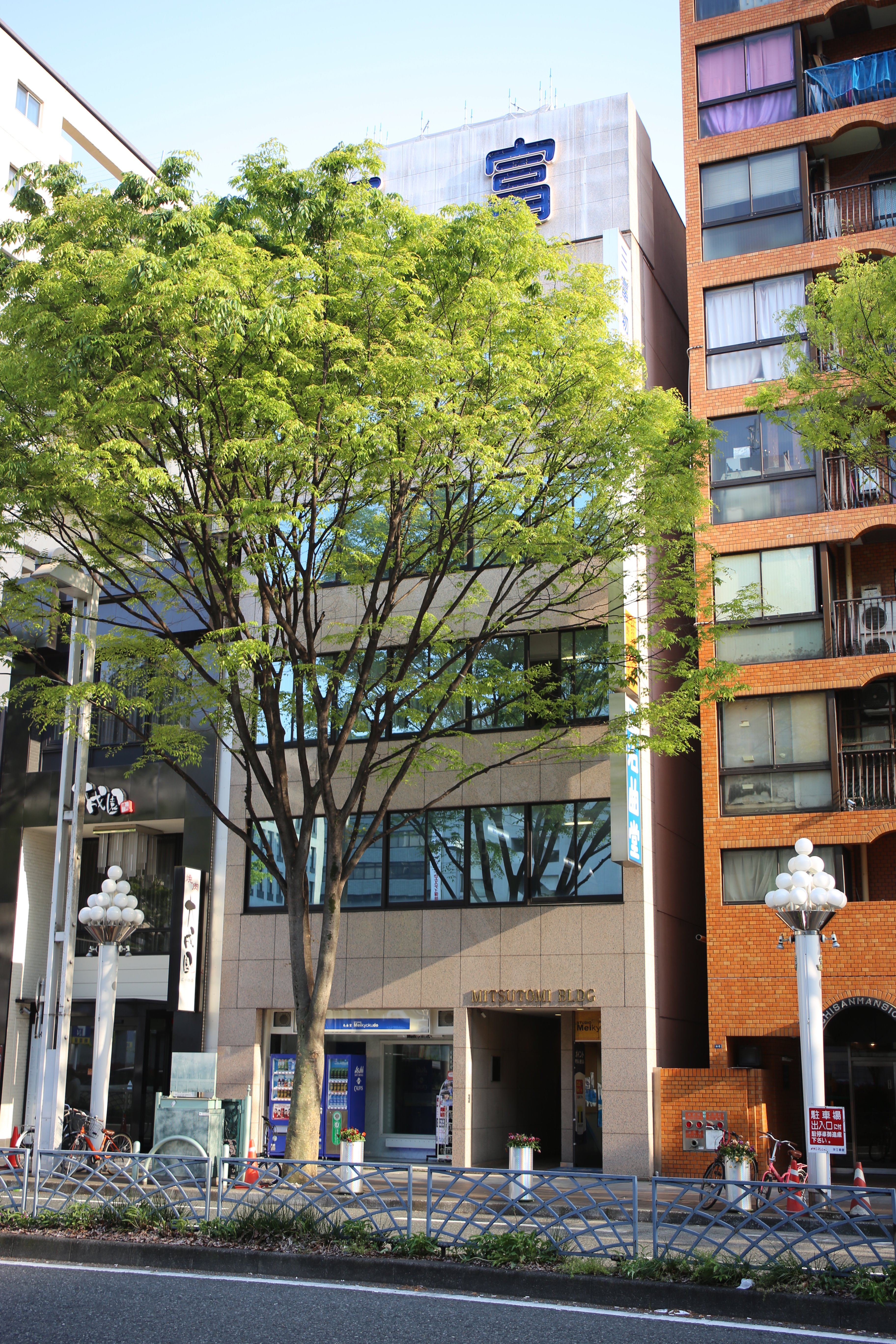 名古屋市中区栄二丁目の三富広小路ビルを北側公道西側より撮影